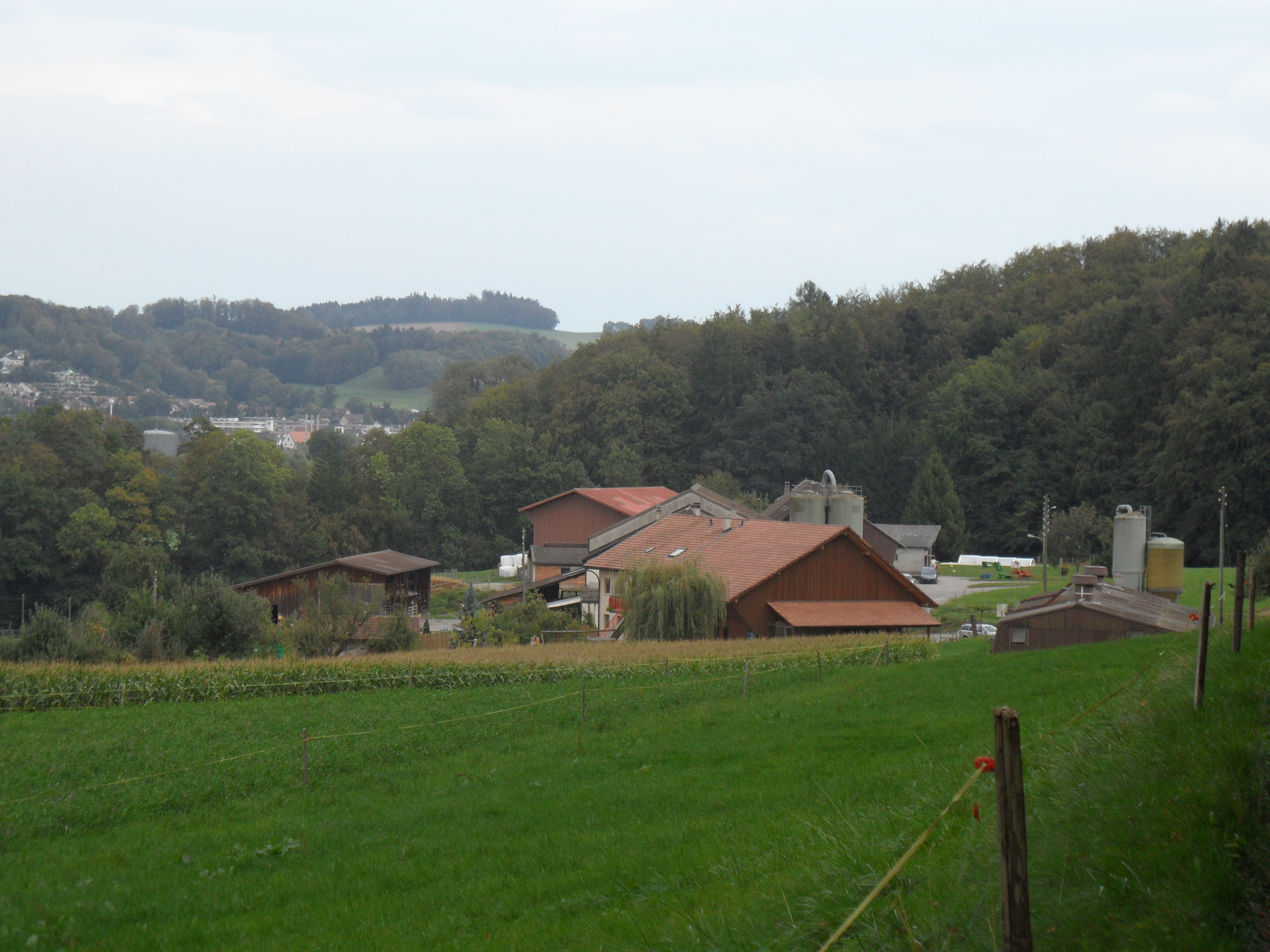 Hameau de Chésalles à Marly, canton de Fribourg en Suisse.